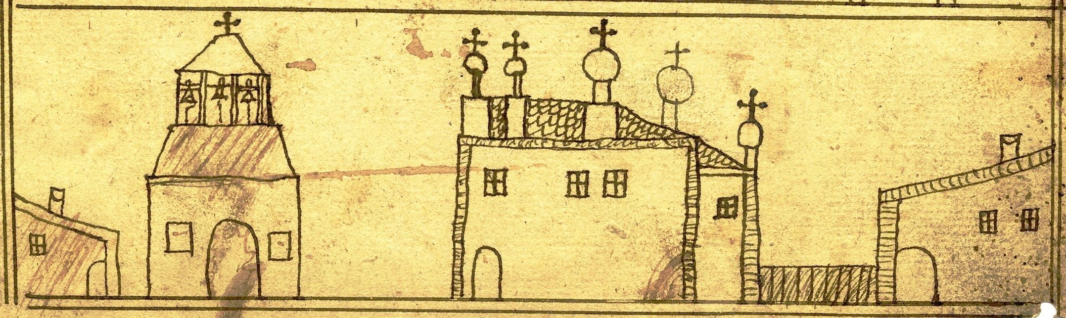 Беларуская (тарашкевіца): Валосавічы (Vałosavičy). Царква